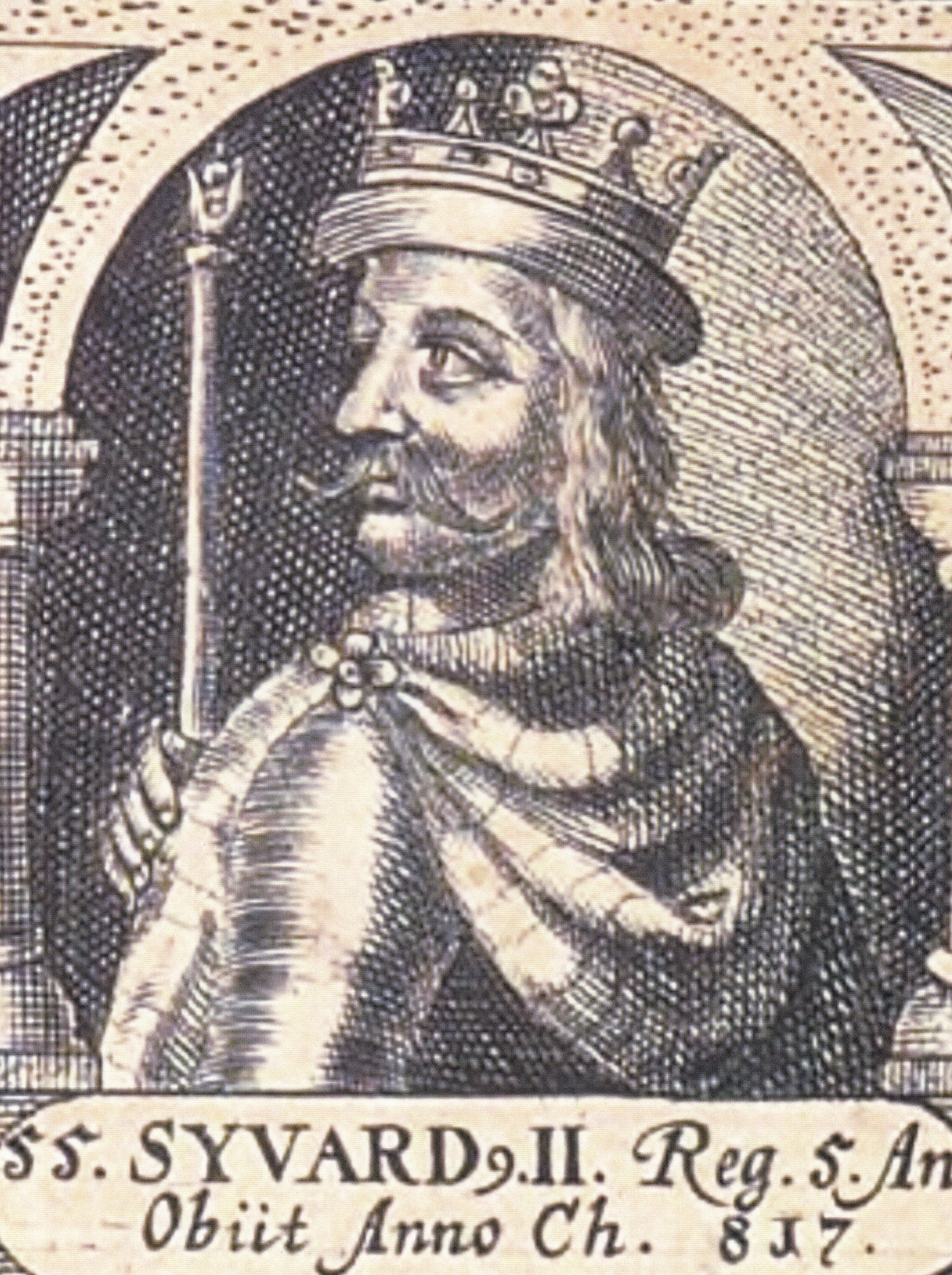 Mindre udsnit forestillende den danske konge (eller tronprætendent) Sigfred (Sigurd Ring (II)) fra "Veræ effigies regum omnium qvi a primo Dan usqe Christianum IV modo regnantem imperii Danici gloria eminuerunt" udgivet i 1670 af Erico Olai Tormio. Sigfred var kortvarigt i 812 et af to kongsemner, der kæmpede om magten i Danmark. Han faldt i et stort slag og sejrherrerne i slaget stillede med de to næste danske konger, Reginfred og Harald.